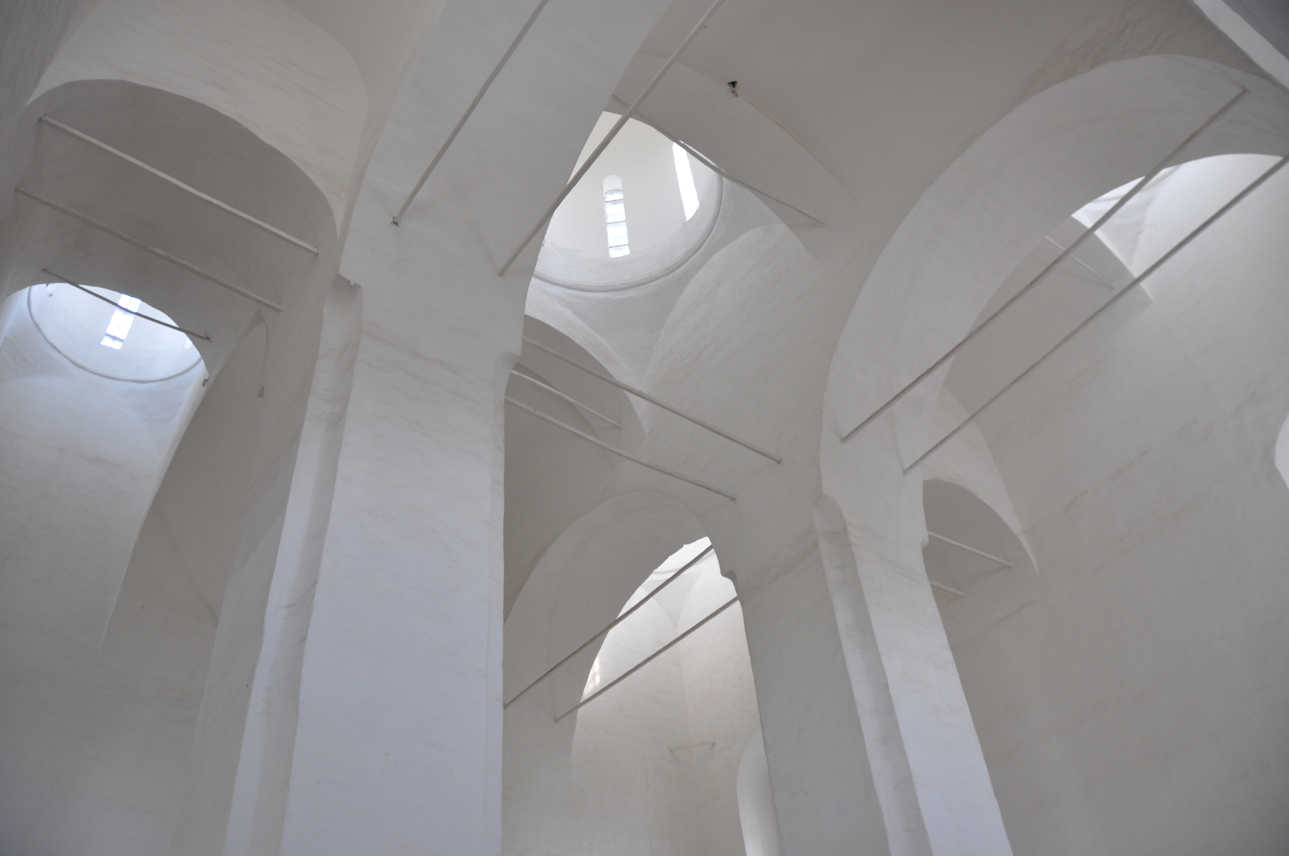 Церковь Николая во Владычной слободе, Вологда. Своды поддерживают два столпа